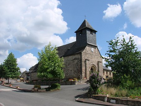 Eglise du XII ème siècle